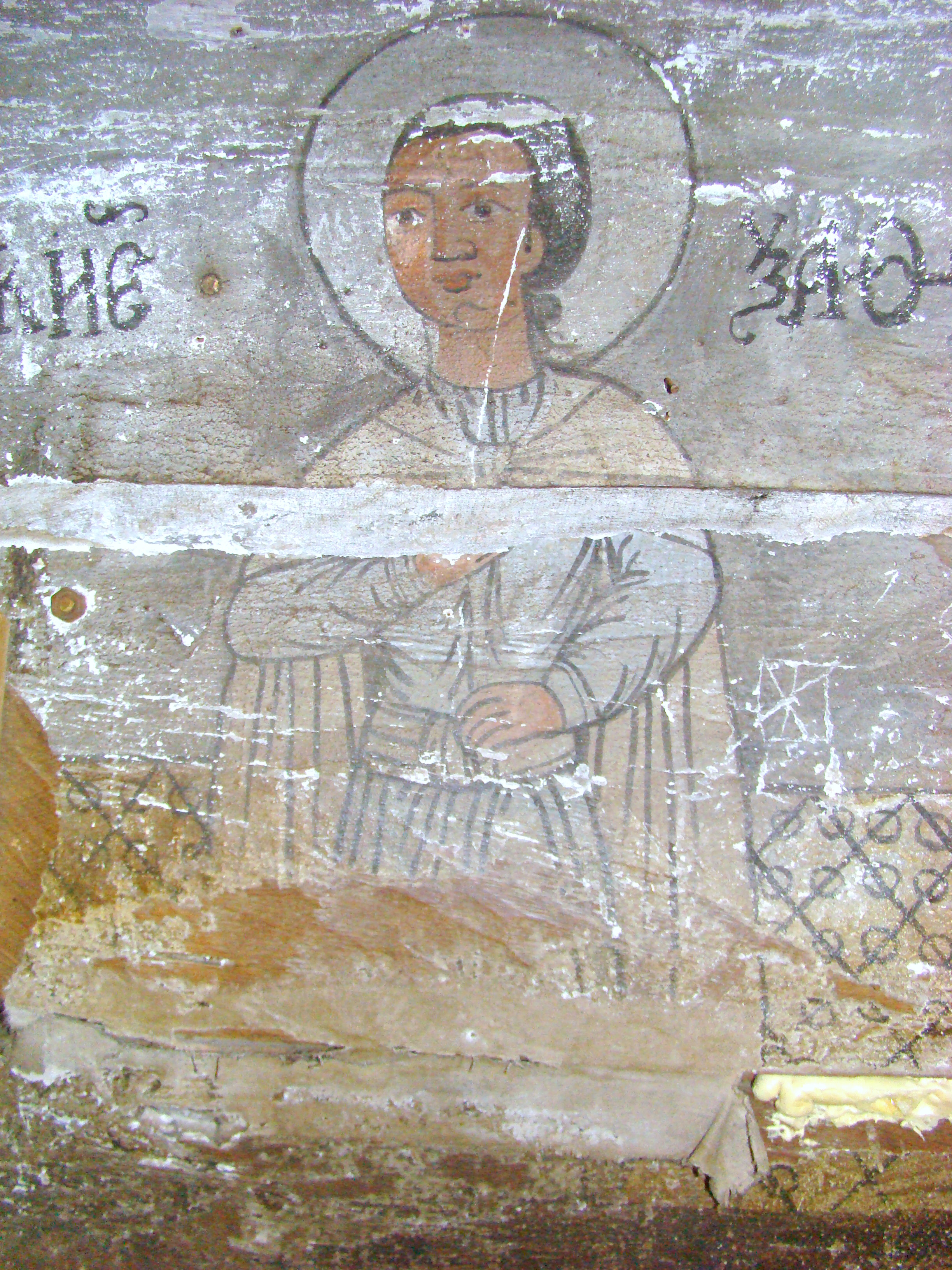 Biserica de lemn din Stolna, județul Cluj